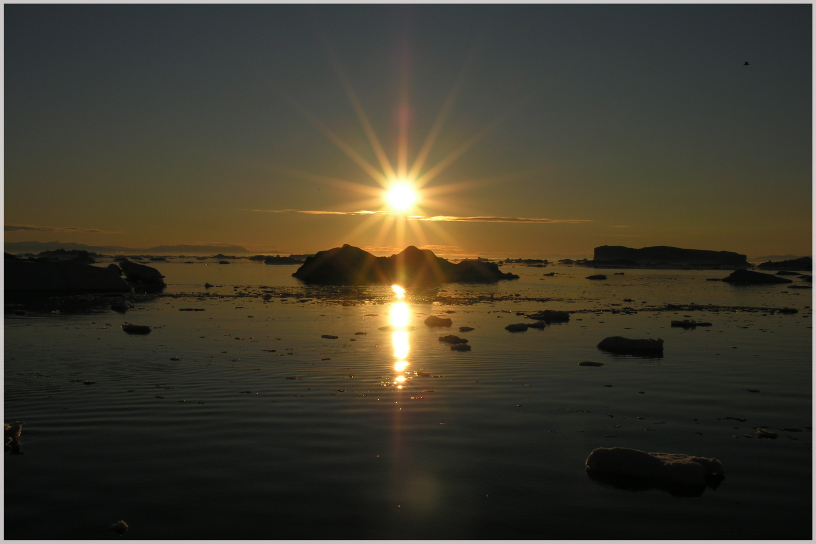 Just Midnight....., Greenland